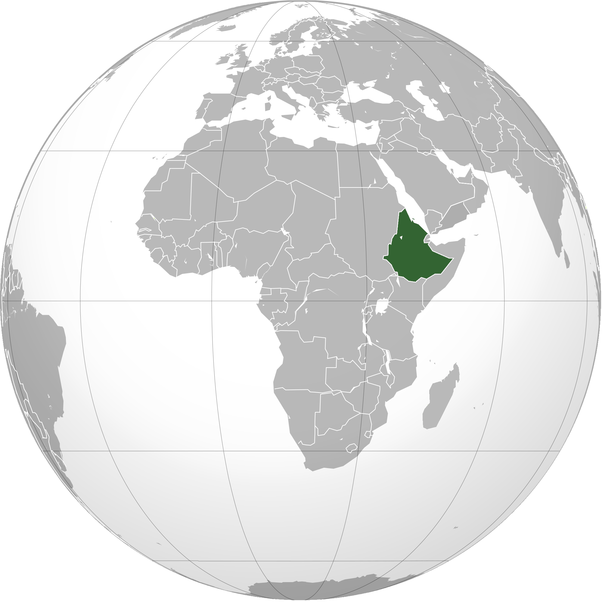 Mapa de localicación de la Federación de Etiopía y Eritrea, imagen sacada de la enWiki, creada por el usuario "VoodooIsland"